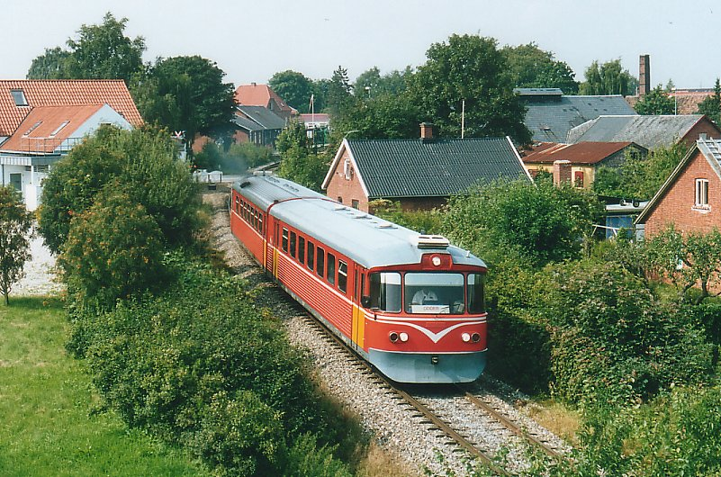 Odderbanen Lynette DMU at Tranbjerg, Denmark